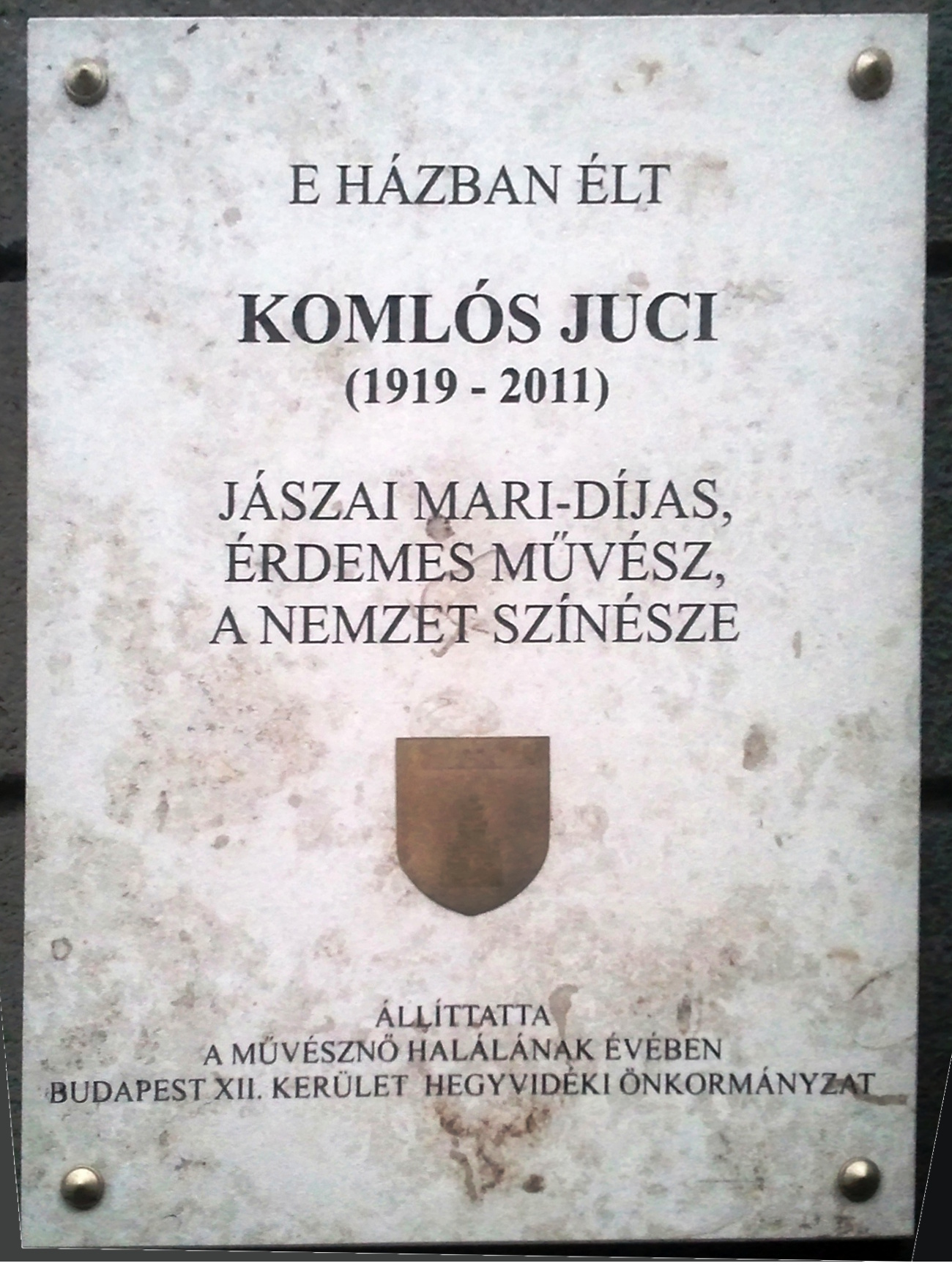 Komlós Juci emléktáblája. Budapest XII. kerület Városmajor utca 49